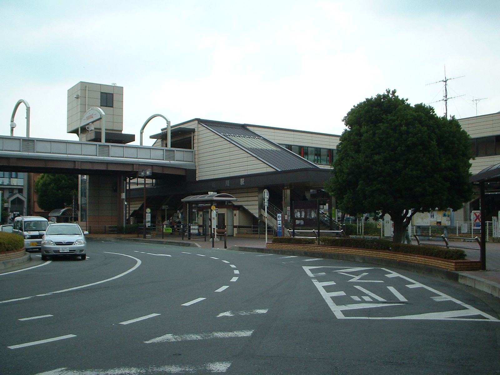 桶川駅の西口とロータリー